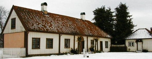 Riddergården i Hønefoss, våningshuset og nystuen